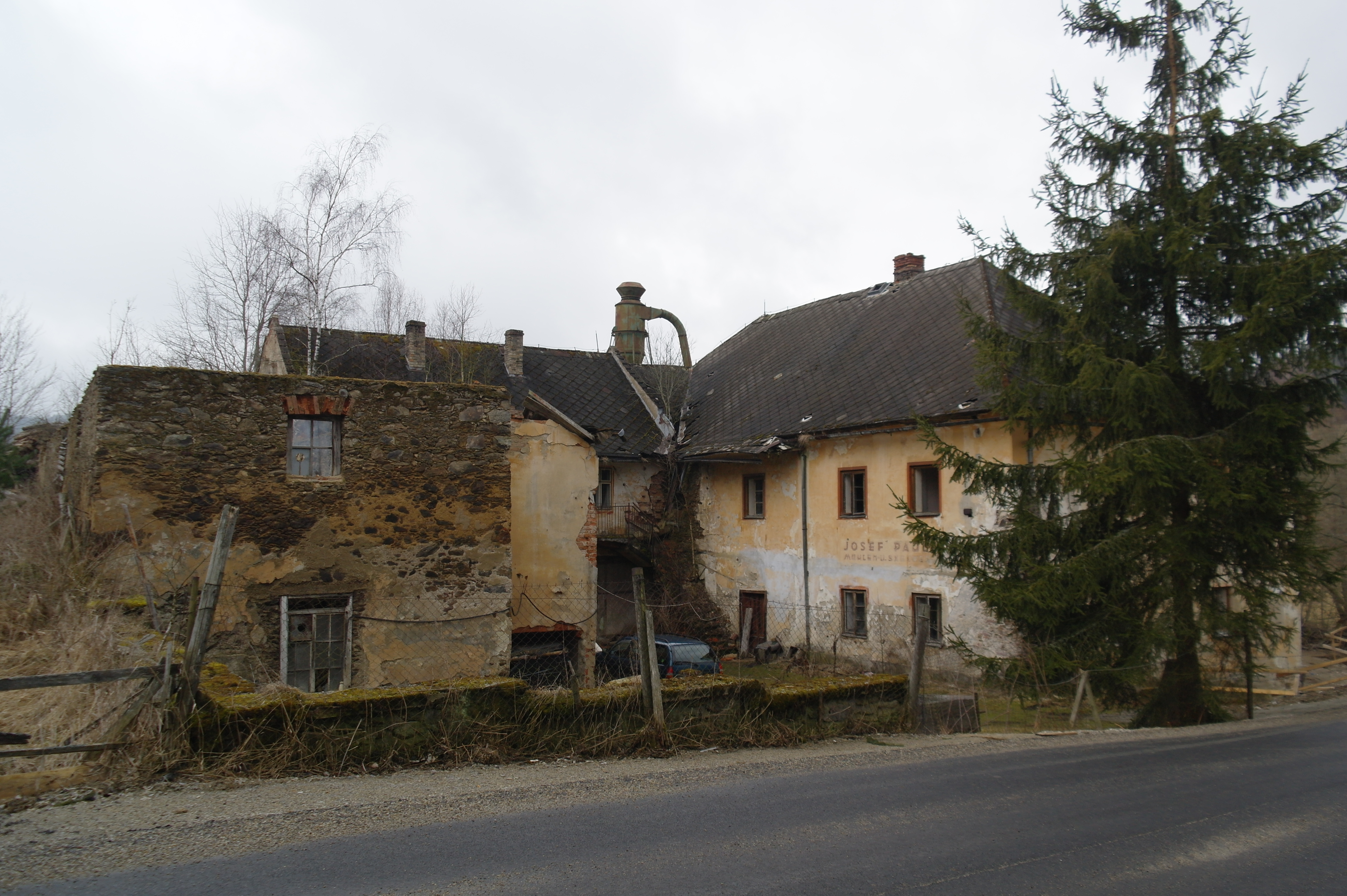 Blanický mlýn